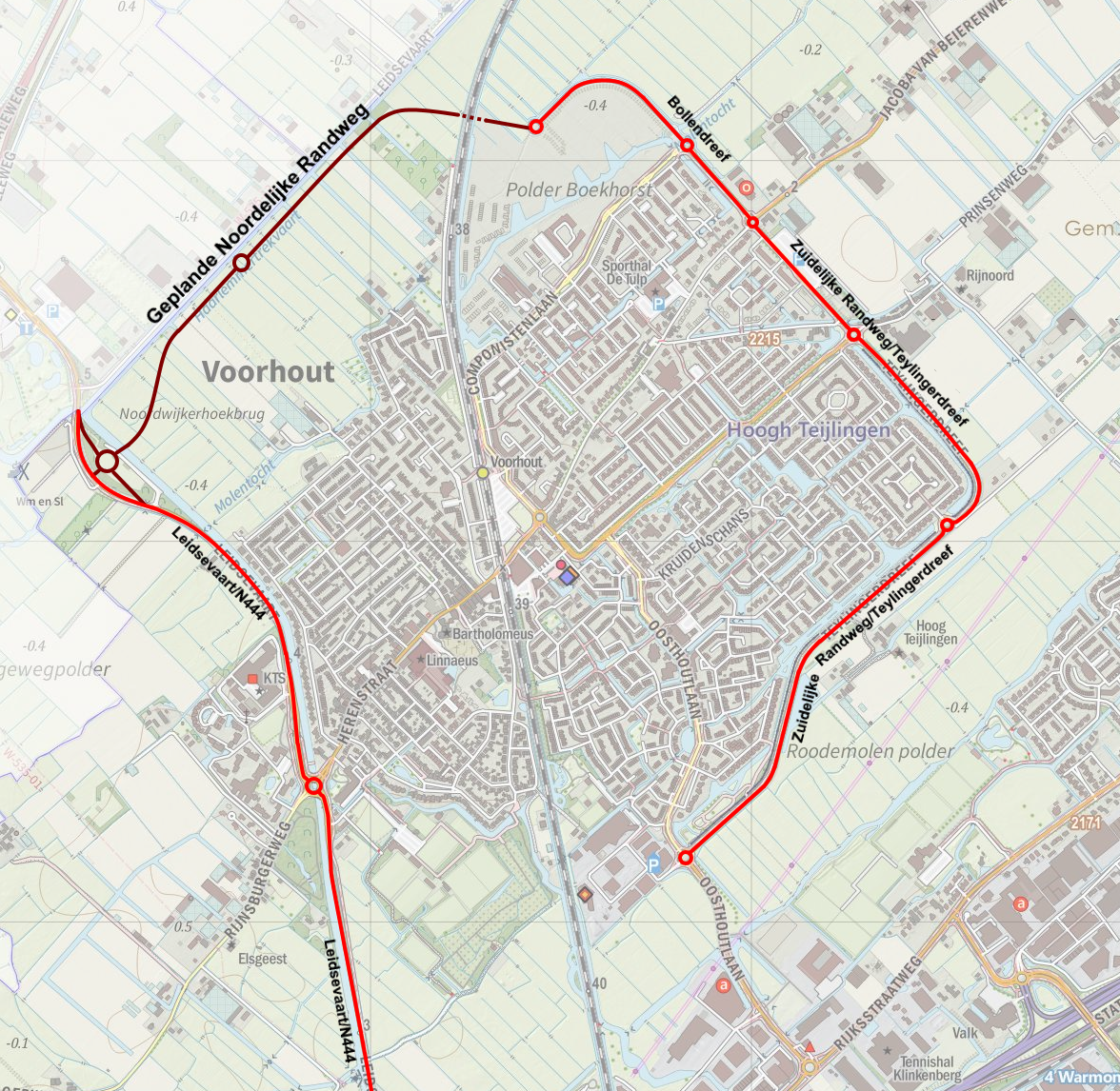 Verduidelijking van de plannen voor de bouw van de Noordelijke Randweg in Voorhout, Teylingen.